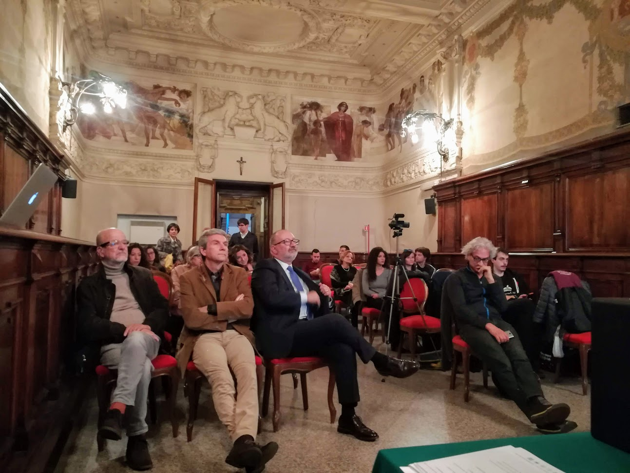 Le donne in Wikipedia. Presentazione ed editathon durante il Festival "Rieti Digital" il 10 novembre 2018.